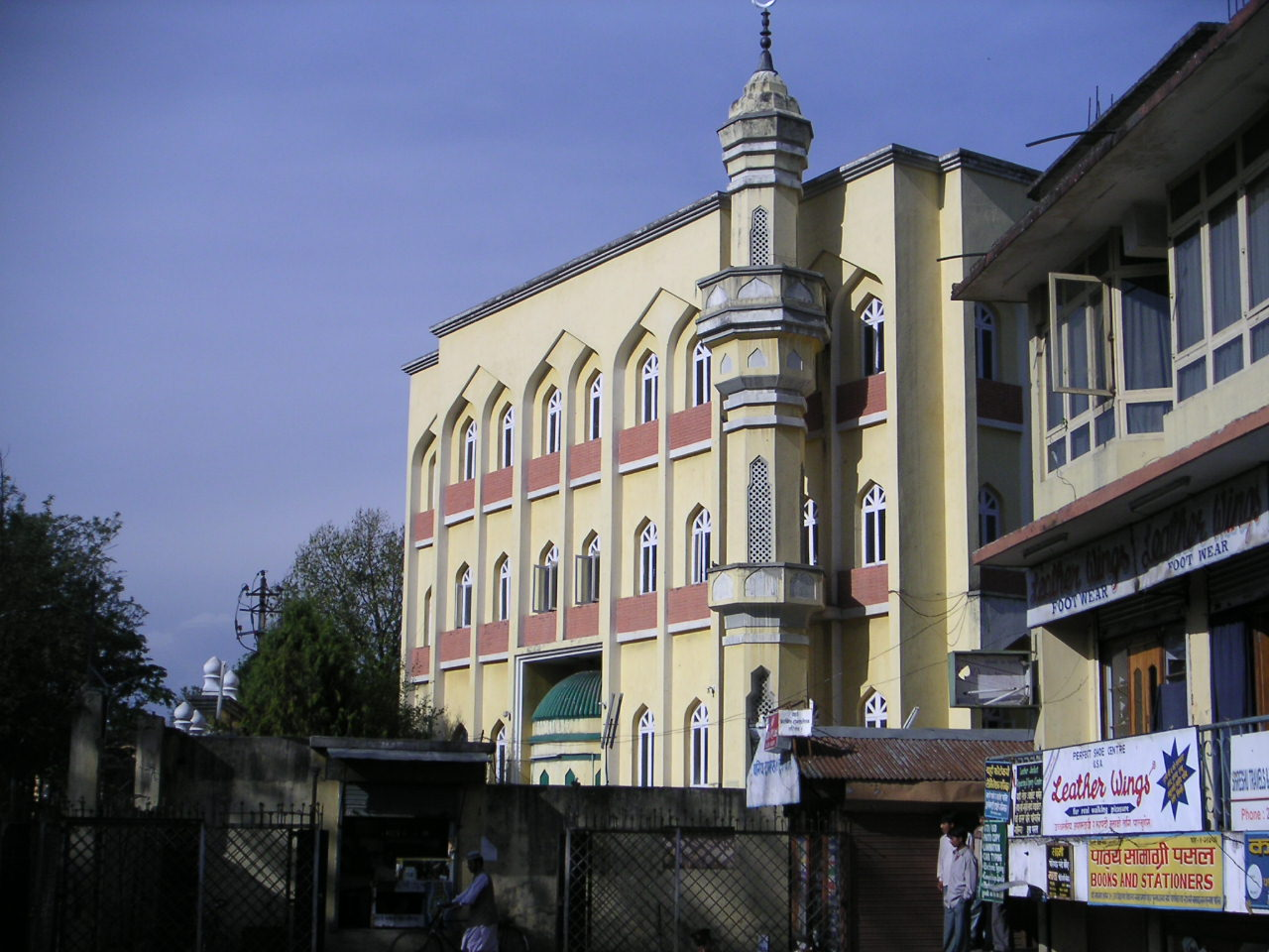 Mosque, Kathmandu. Photo: Soman